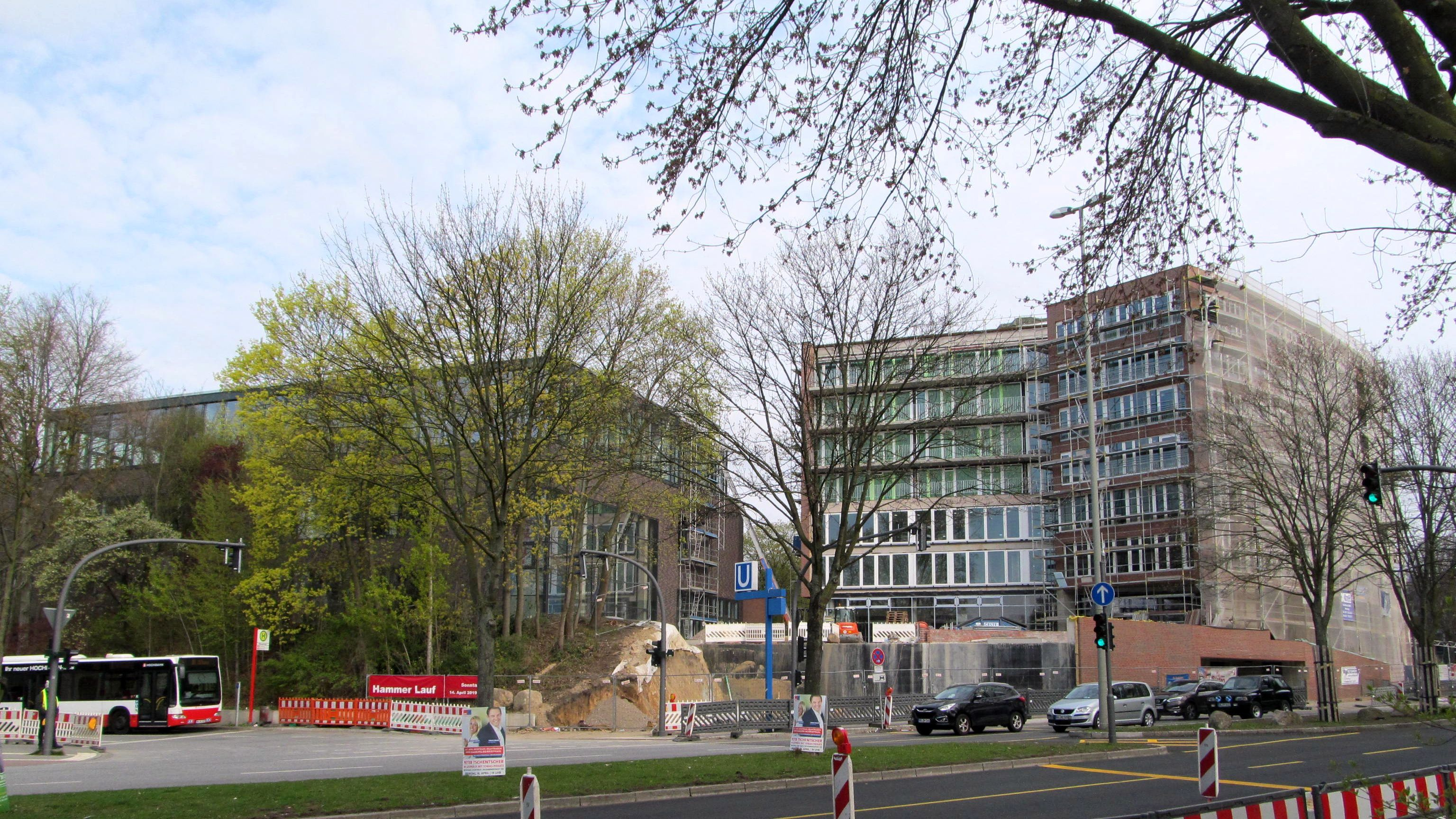 Neubau des Sportzentrums der Hamburger Turnerschaft von 1816 in Hamburg-Hamm, Bauzustand April 2019